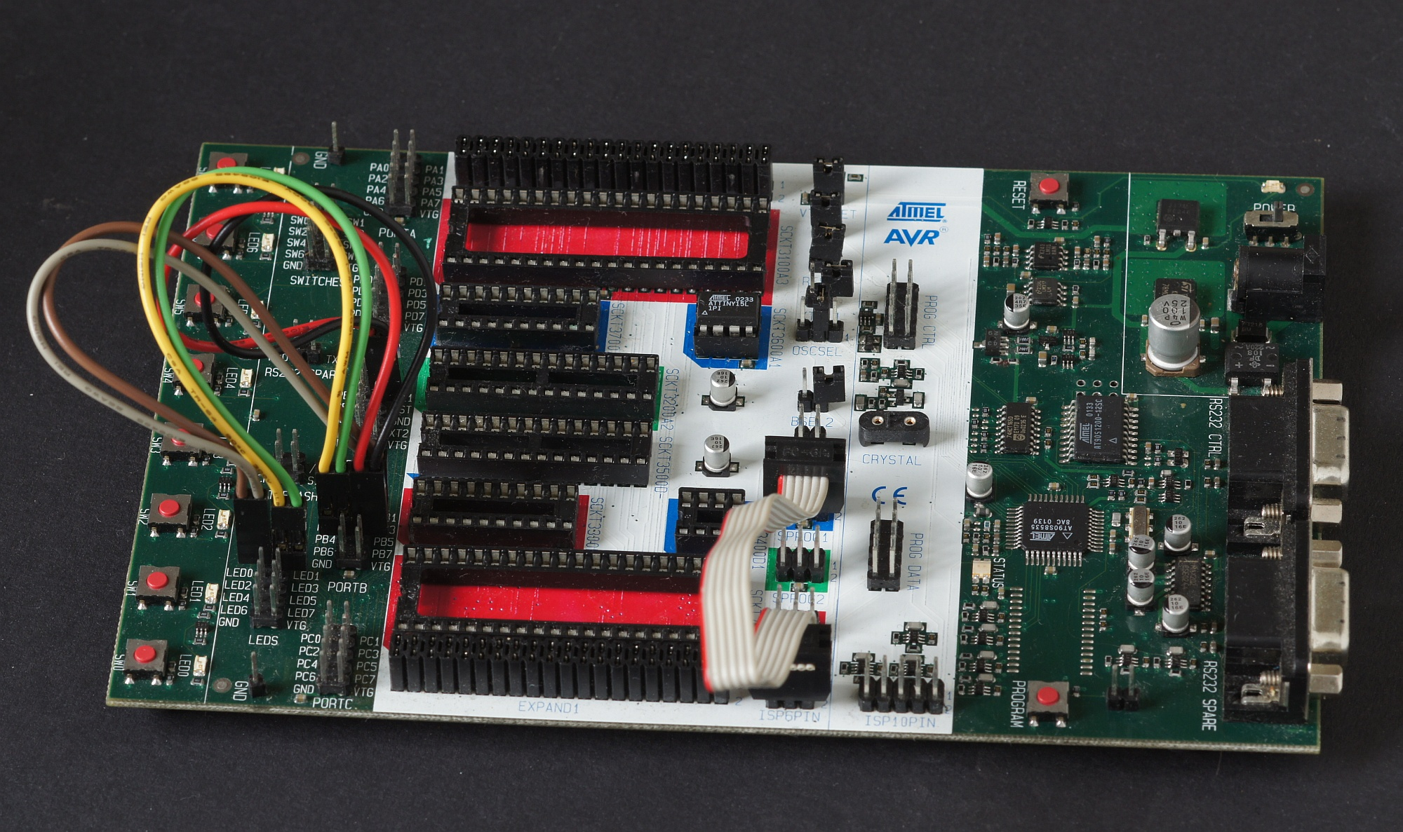 Atmel STK 500 Entwicklerboard für AVR-Mikrokontroller